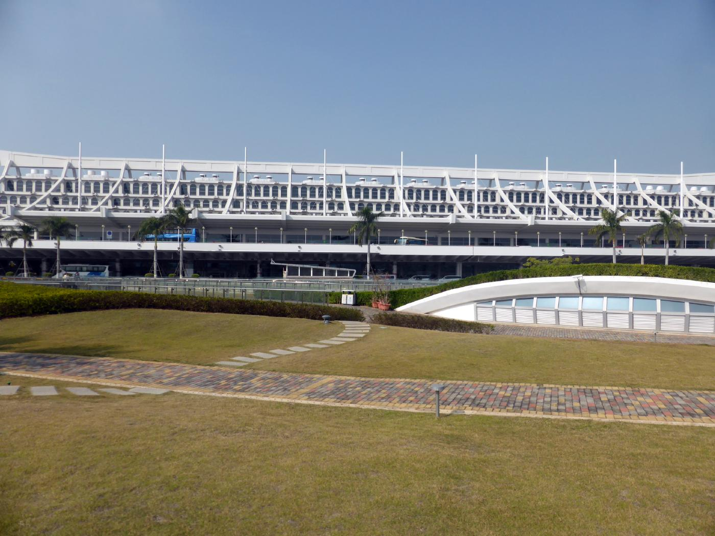 アモイ空港T3